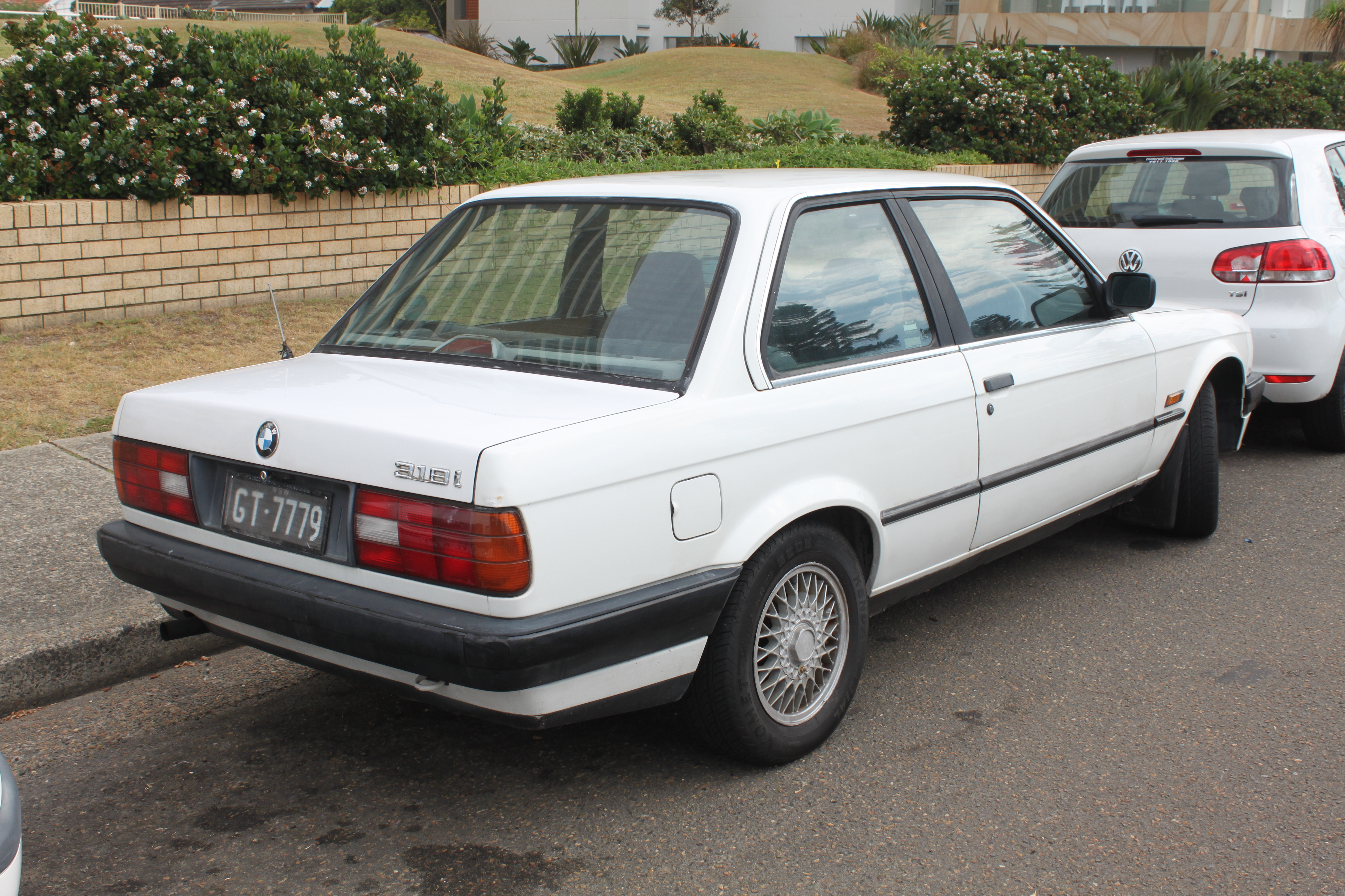 BMW E30 318i